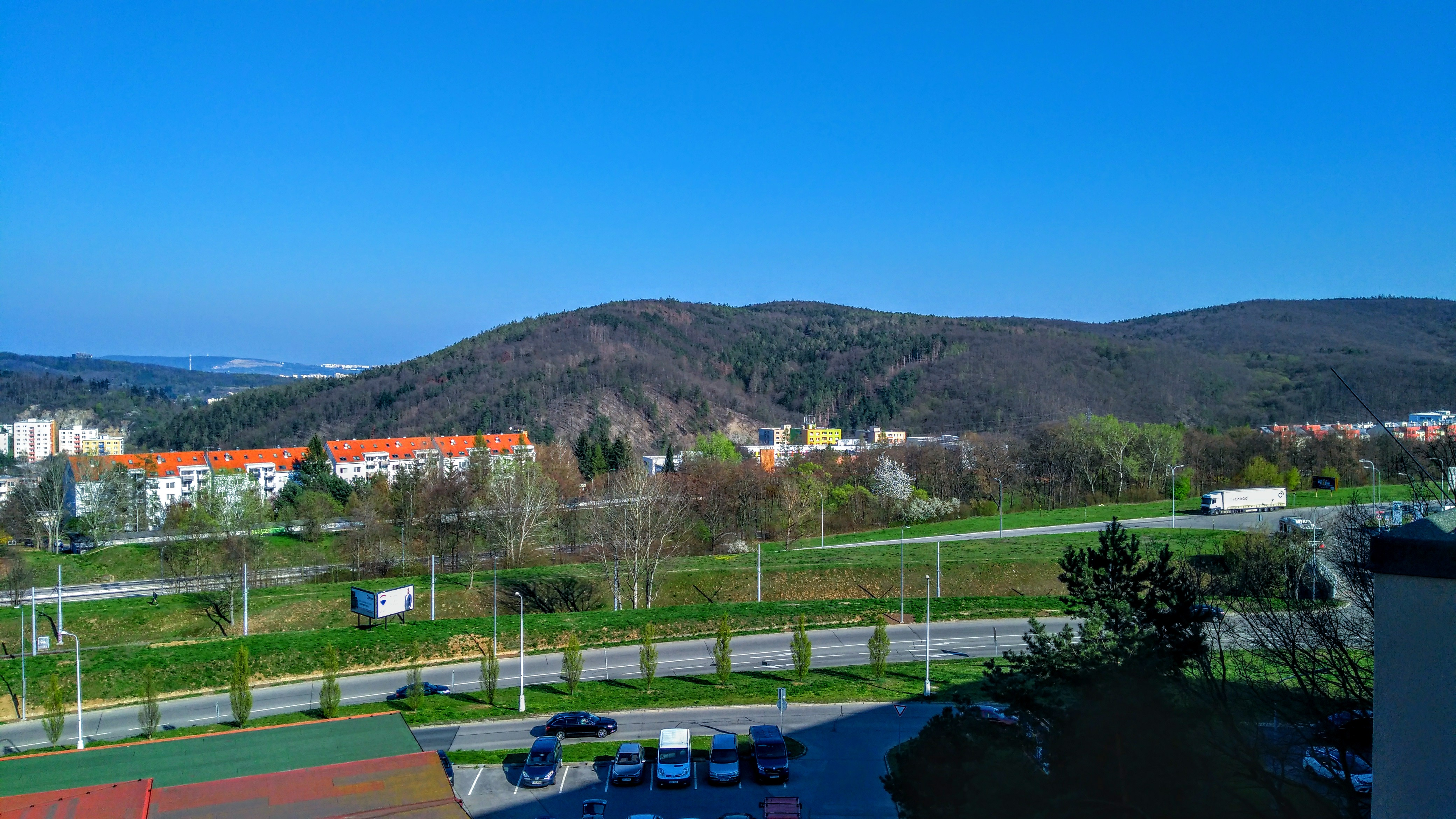 Vrch Holedná z Bystrce.